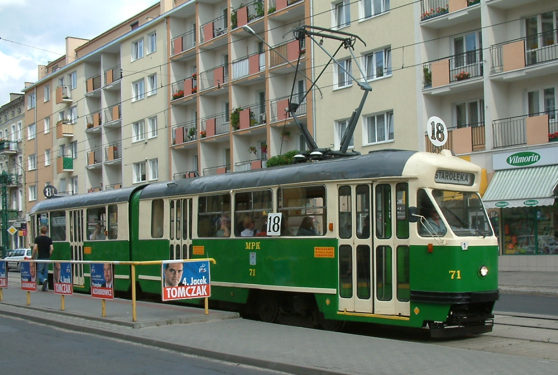 Tramwaj 102Na, ul. Głogowska, Poznań Tram type 102Na, Głogowska Str., Poznań